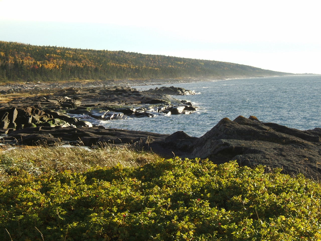 Littoral nord de l'île Verte, dans l'estuaire du fleuve Saint-laurent, au Québec, vu à partir du phare. Septembre 2006. Auteur : Nicolas gagnon